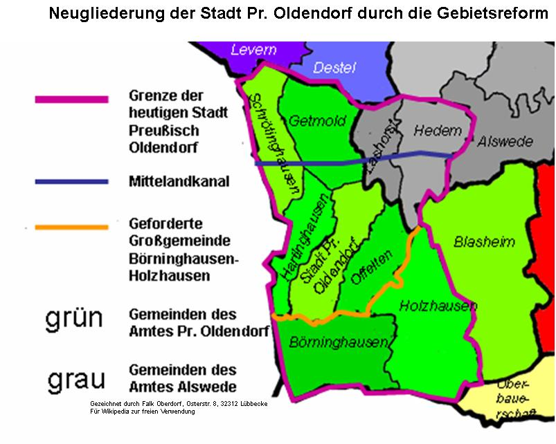 Kommunale Gliederung der Stadt Preußisch Oldendorf